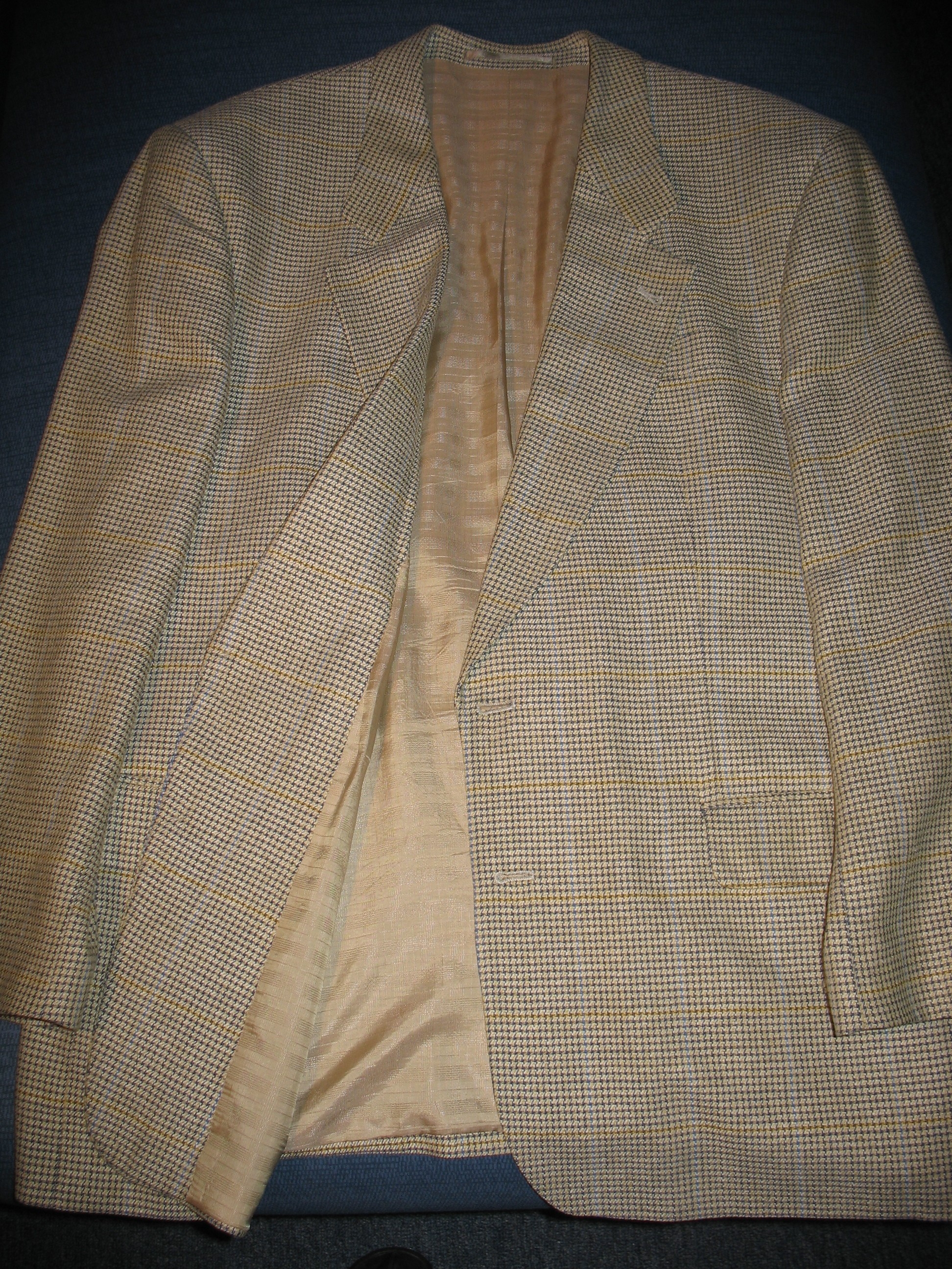 Sakko